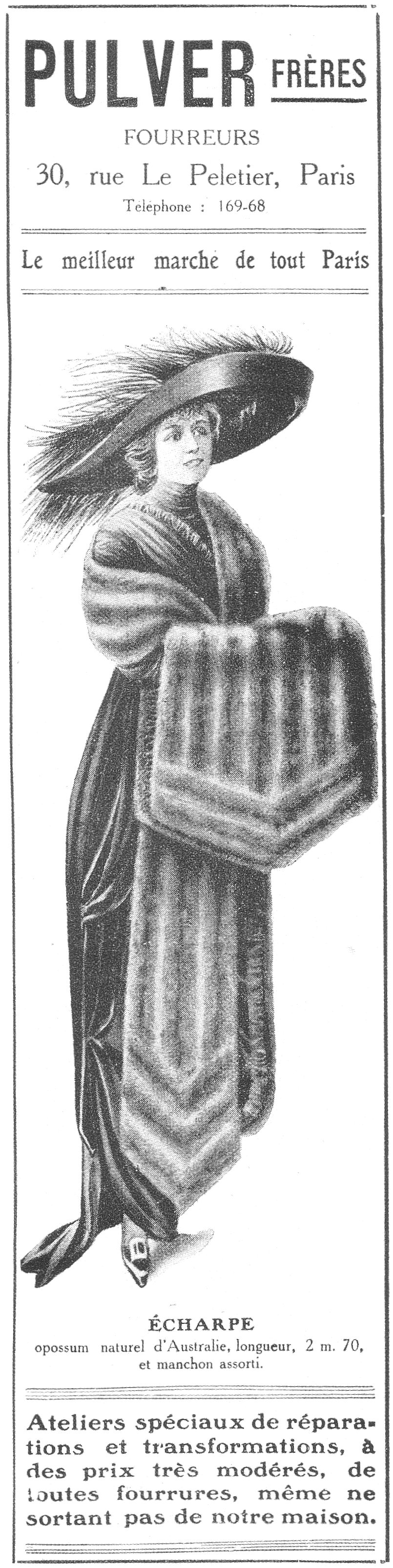 Pulver Frères, Fourreurs, 30, rue Le Peletier, Paris 1912: Écharpe opossum naturel d'Australie, longueur, 2 m. 70, et manchon assorti.